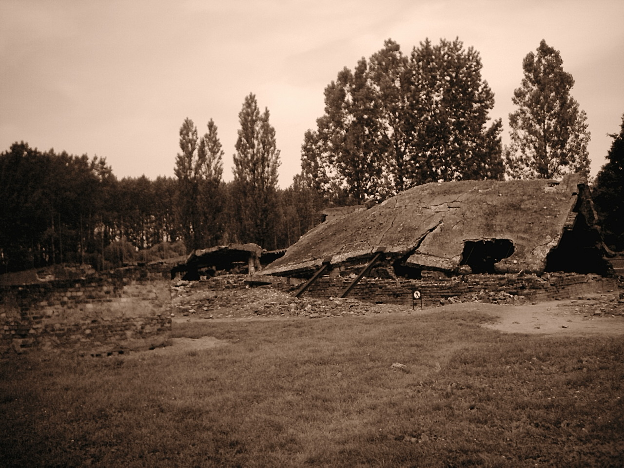 Überreste eines gesprengten Krematoriums in Auschwitz-Birkenau. Farbton: Sepia